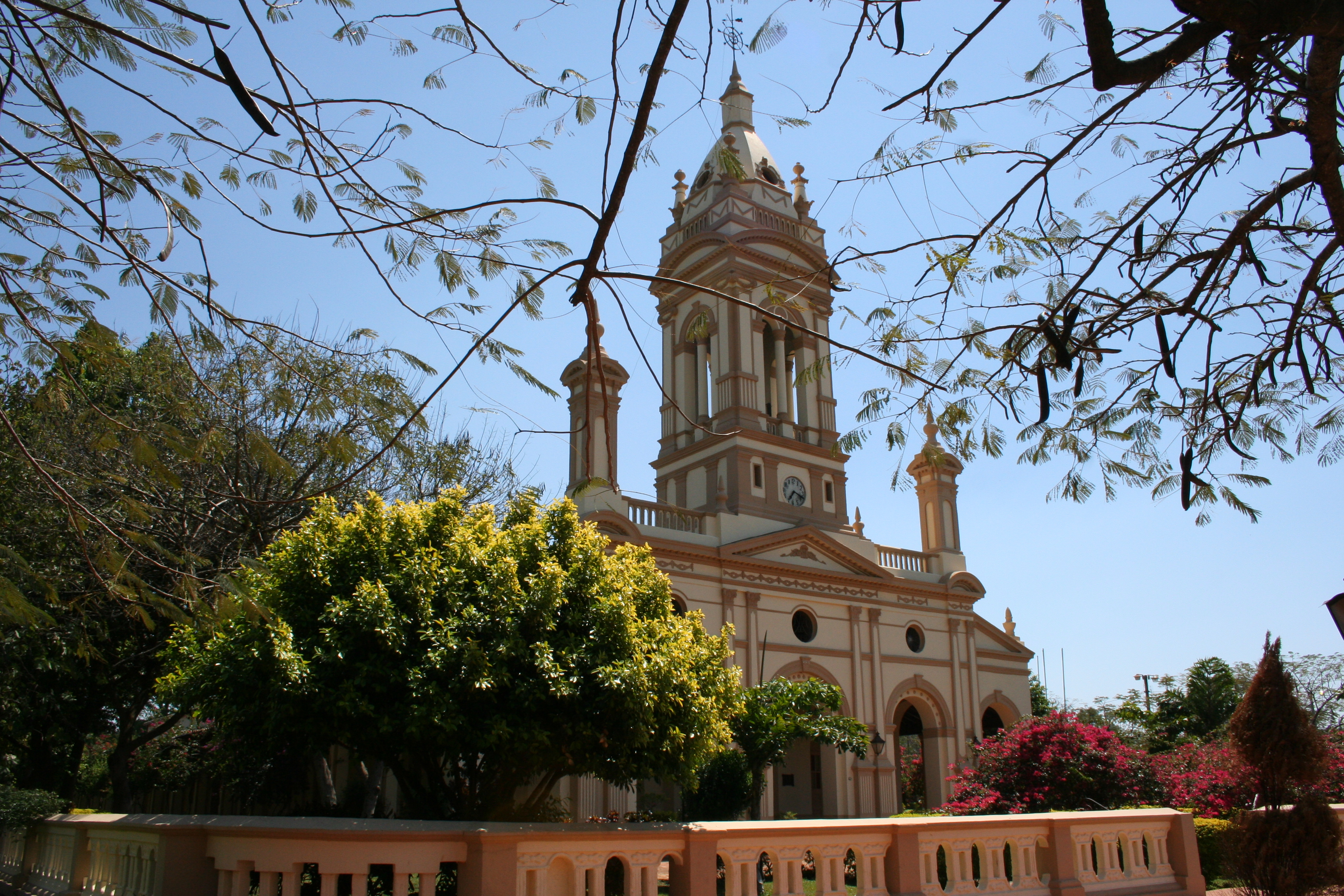 IGLESIA 2